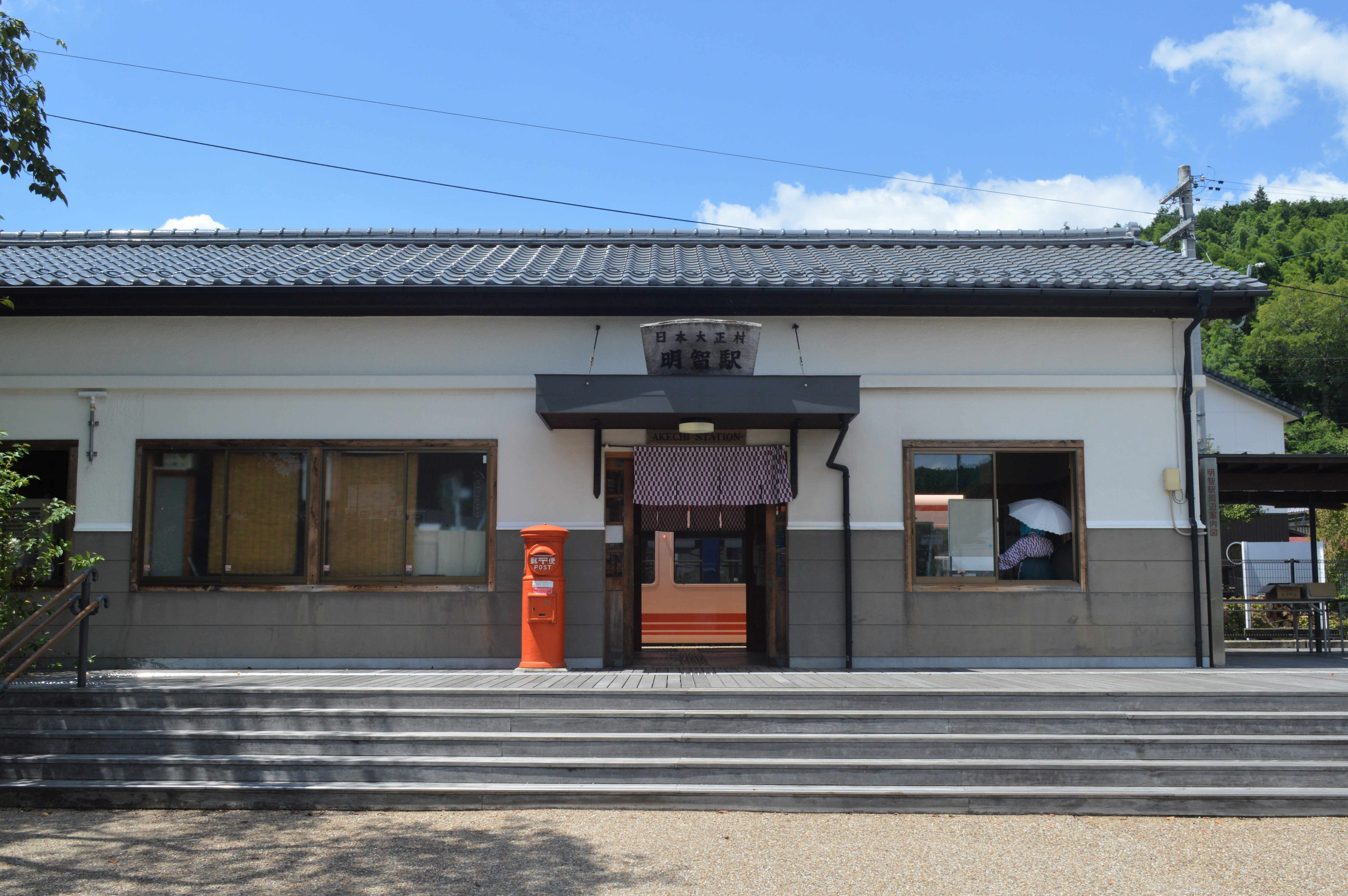 岐阜県恵那市にある明知鉄道明知線明智駅。